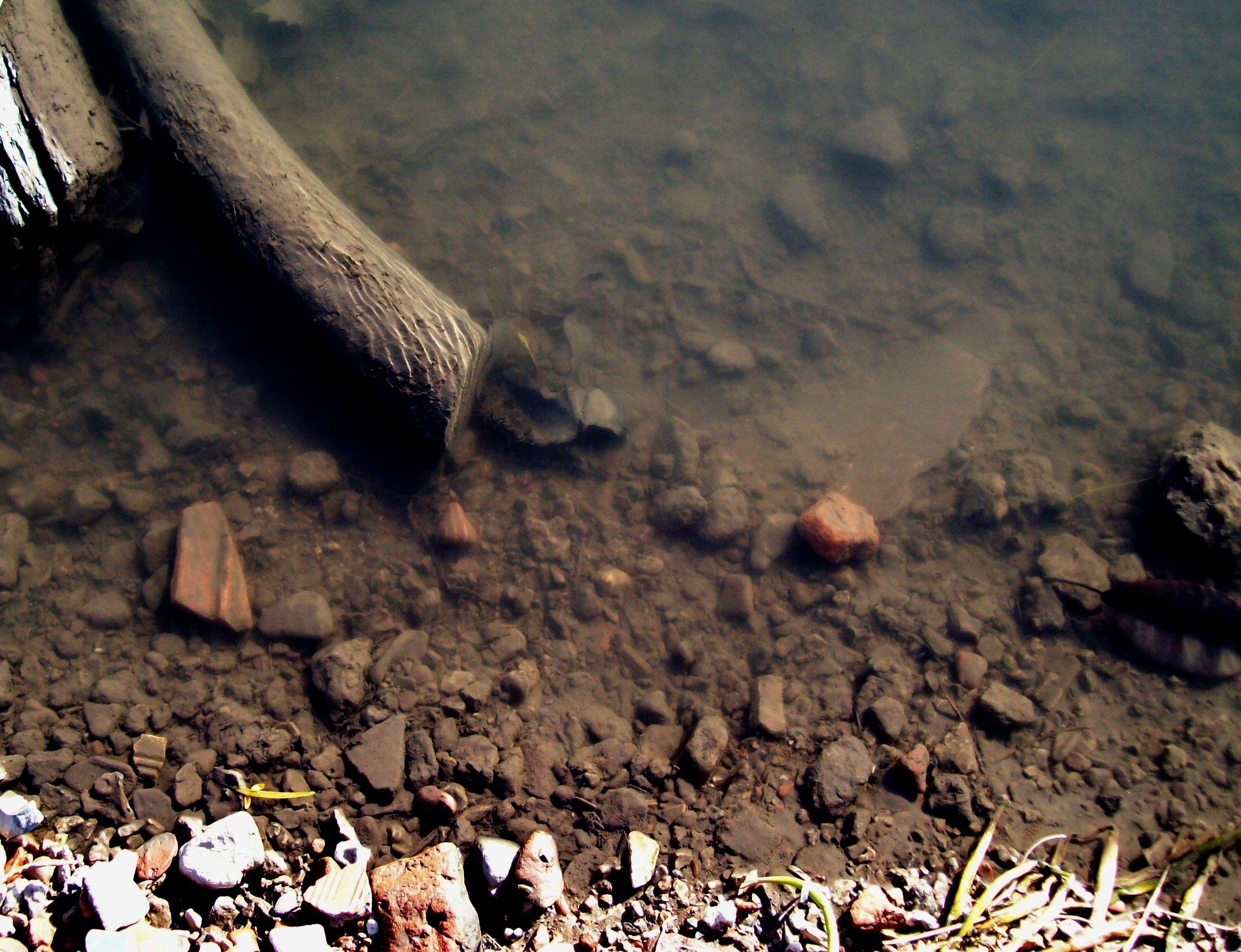 El arroyo Raggio, frontera entre la Ciudad Autónoma de Buenos Aires y la provincia de Buenos Aires, en el centro-este de la Argentina.